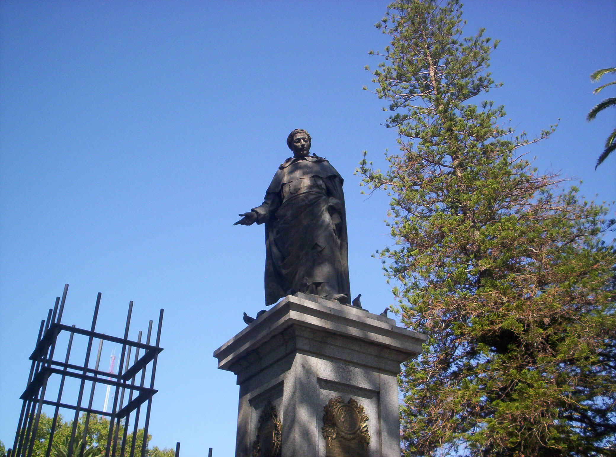 Fotografía que muestra un monumento de Fray Justo Santa María de Oro (primer obispo de San Juan Cuyo y diputado que represento a San Juan en la declaración de la independencia el 9 de Julio de 1816). Esta ubicado en la Plaza 25 de Mayo, en la ciudad de San Juan Argentina